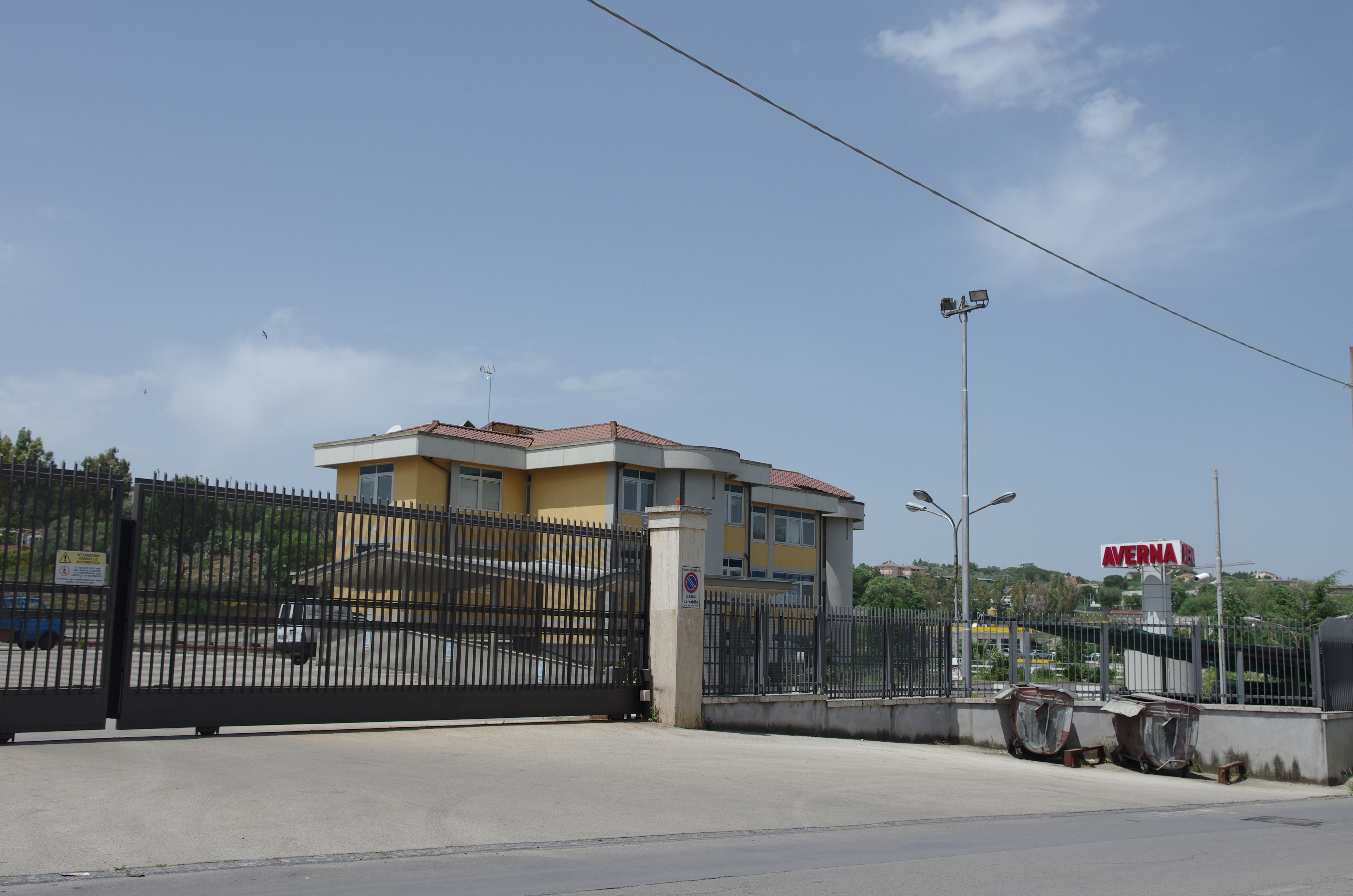 Die Fabrik von Fratelli Averna in Caltanissetta.